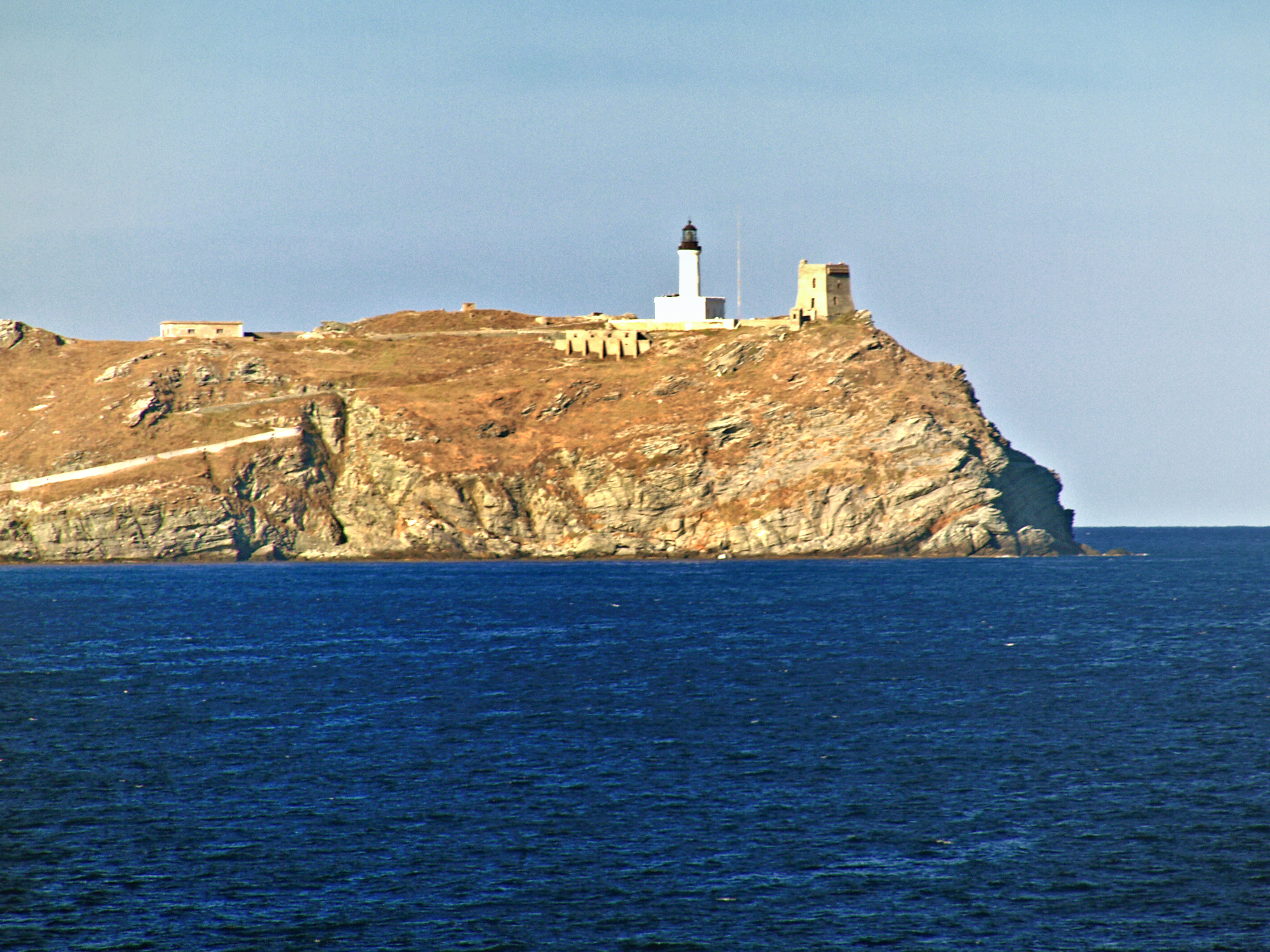 Ersa (Corsica) - La Giraglia, phare et tour génoise